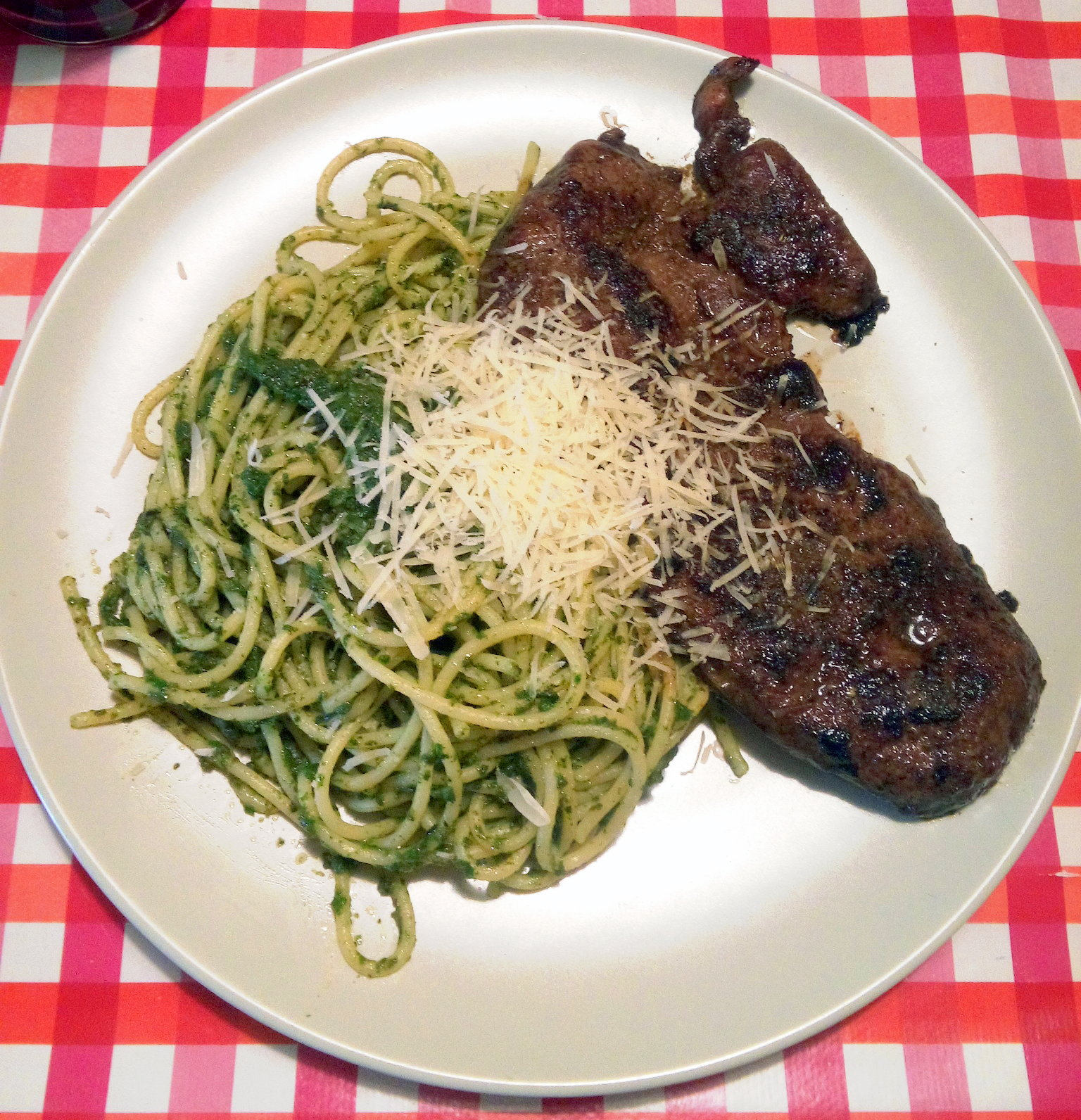 Plato de tallarines verdes, versión peruana del pesto